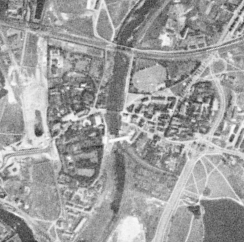 Poznański Ostrów Tumski, Śródka i rondo Środka sfotografowane przez amerykańskiego satelitę wywiadowczego KH-4A 1023, 23 sierpnia 1965 r.